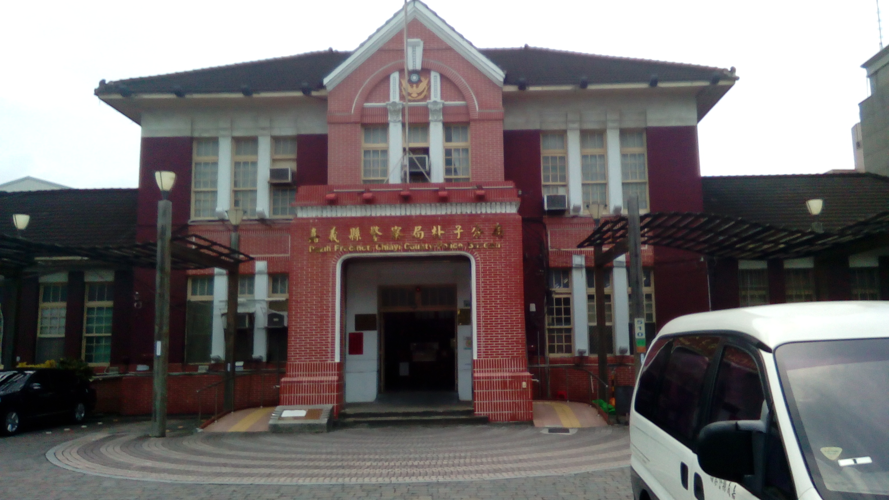 嘉義縣警察局朴子分局